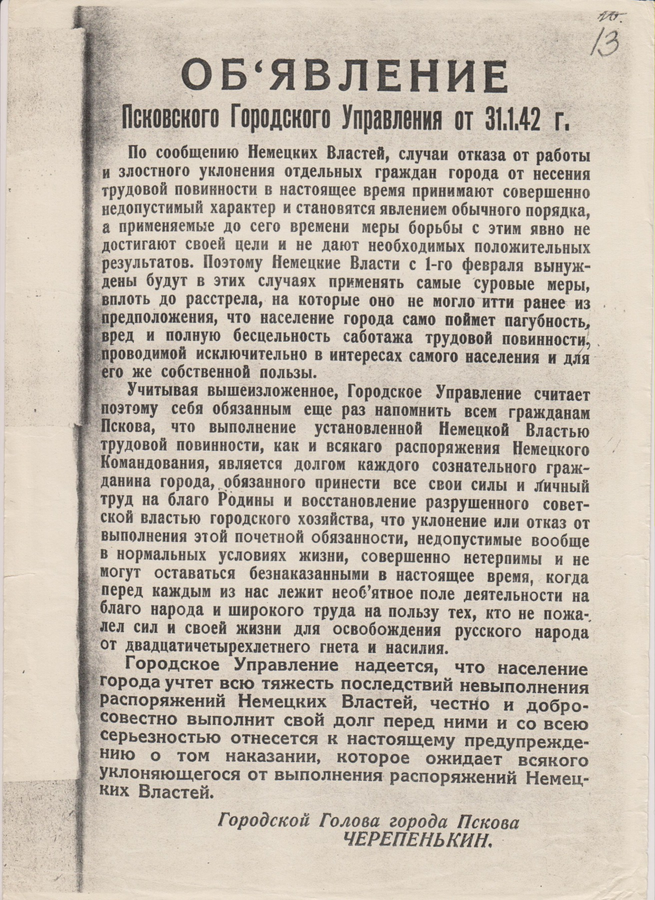 Постановление о положении.